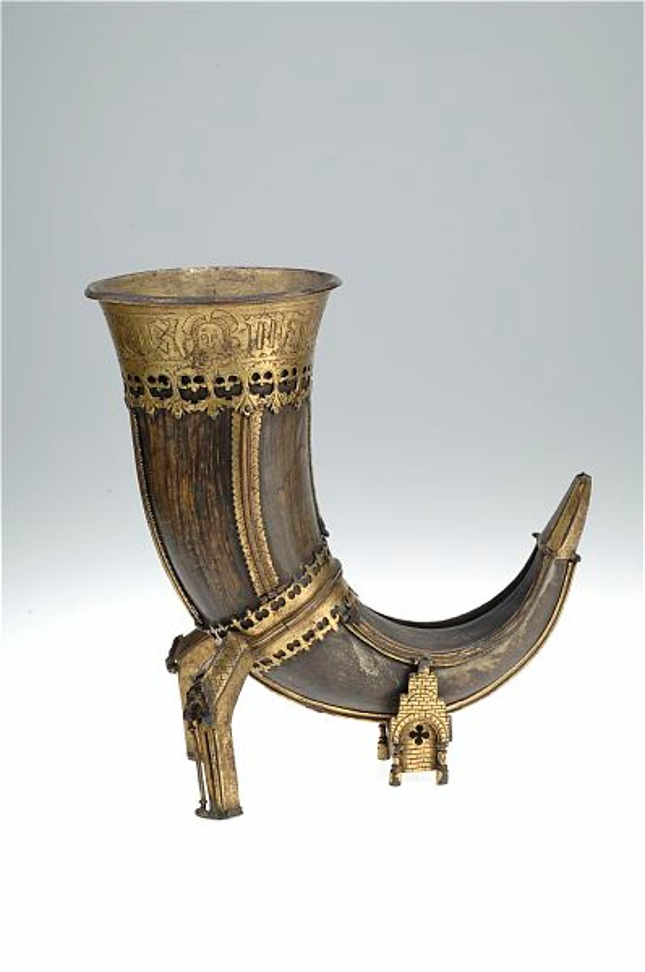 Buffelhorn, Dryckeshorn, Senmedeltid